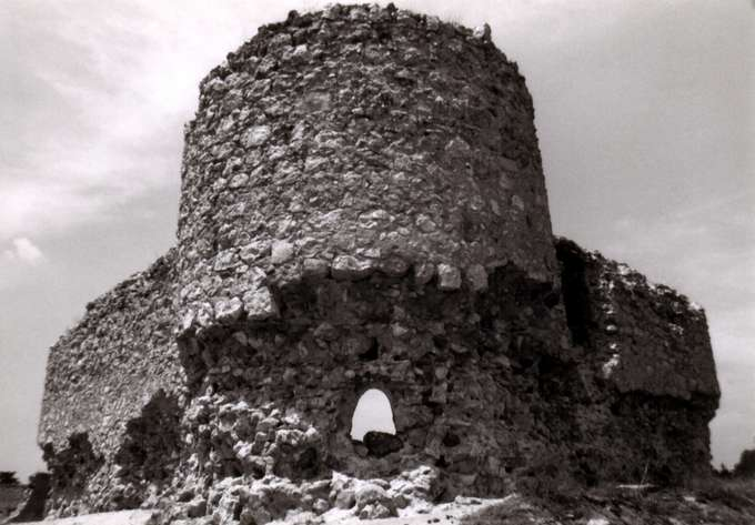 Ruinas del castillo de la Alameda de Osuna (Madrid). Fotografía de mi álbum particular tomada el 16-febrero-1988